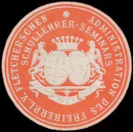 Sealing stamp Title: Administration des Freiherrl. von Fletcherschen Schullehrer-Seminars Description: Freiherr von Fletcher, rot, weiß, geprägt Place: Dresden size: 3 cm